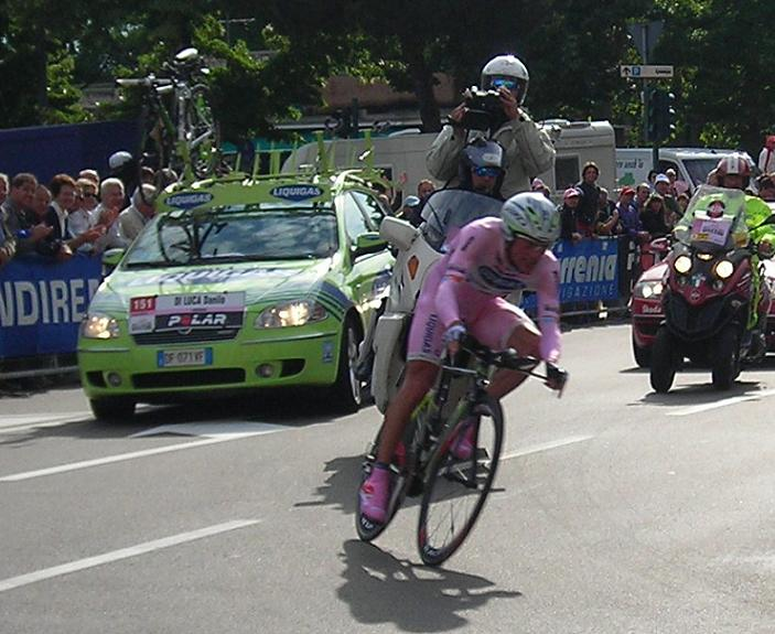 Danilo Di Luca en la 20ª etapa del Giro de Italia 2007 (Bardolino - Verona, 43 km CRI)